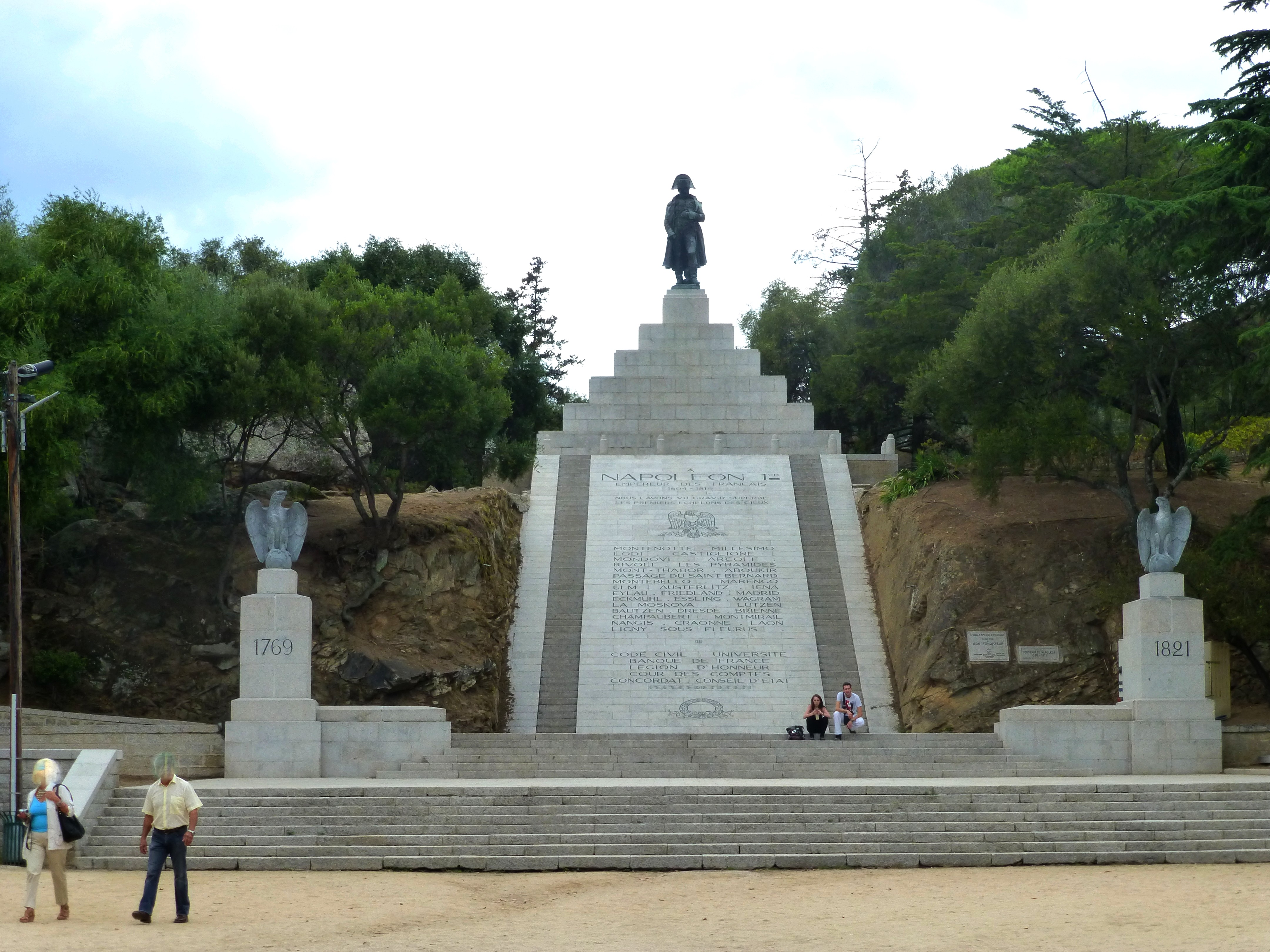 Korsika – Ajaccio – Place d'Austerlitz - Napoleon Bonaparte